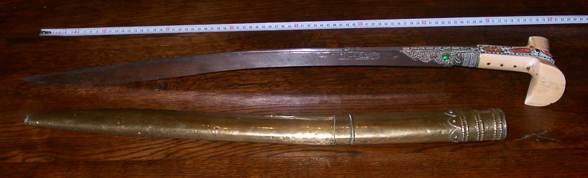 Yatagan